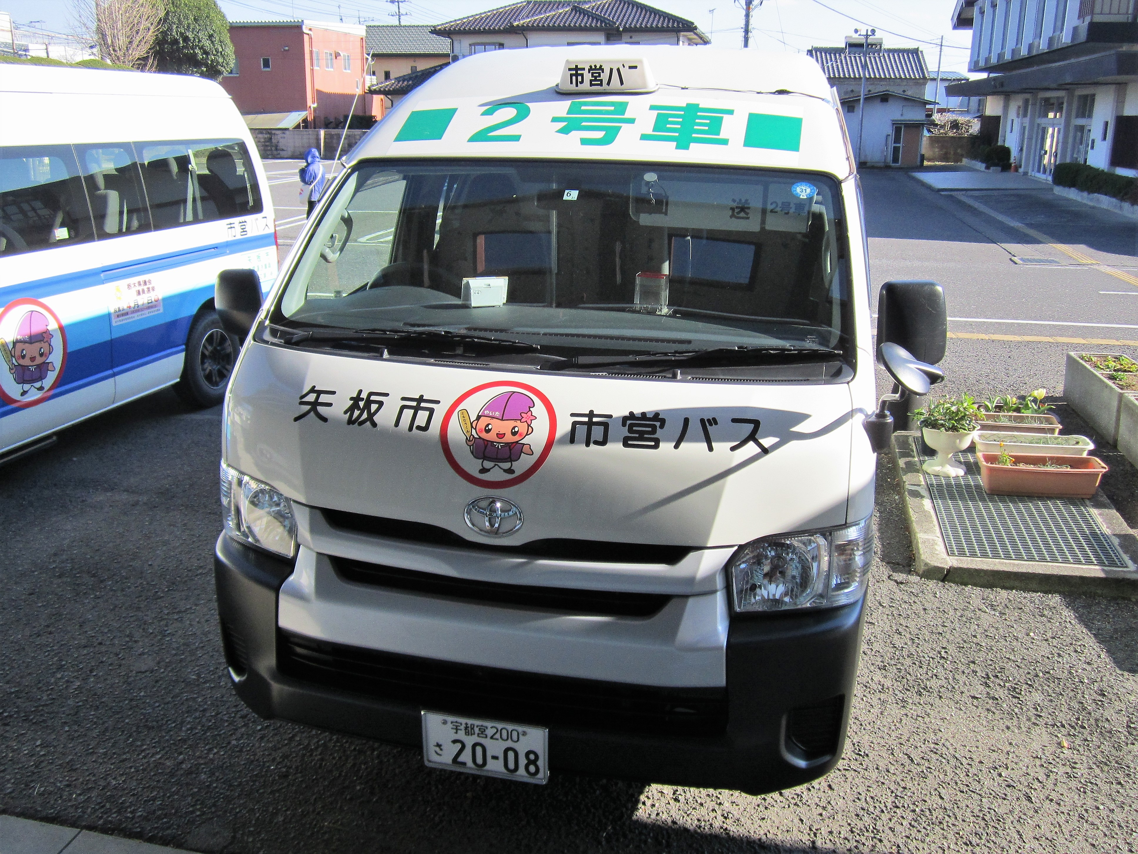 矢板市営バス2号車（矢板市役所にて） Canon PowerShot A2200